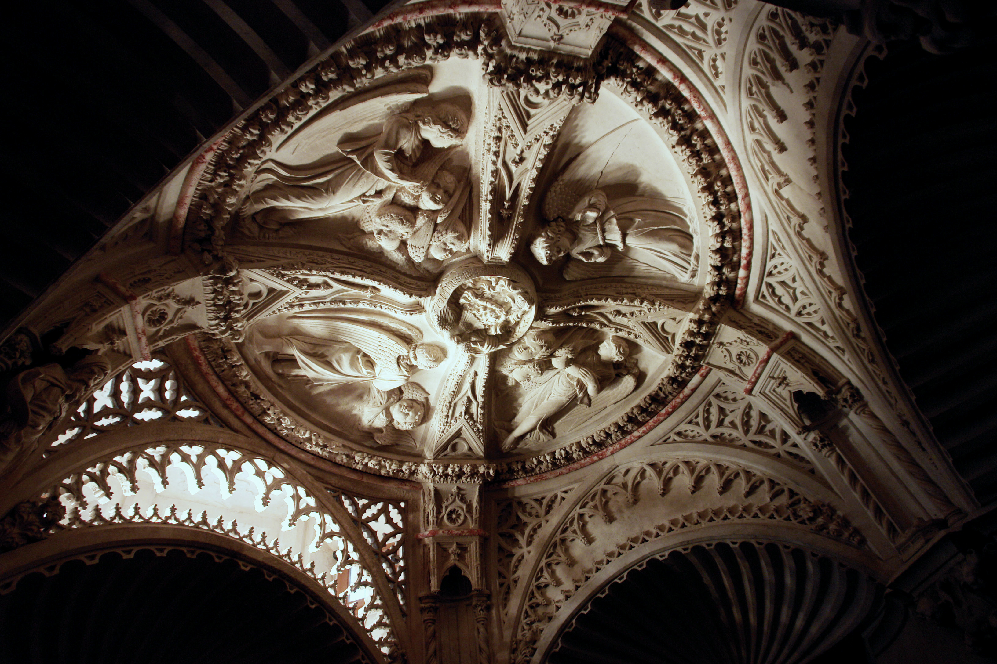 Szent Jakab székesegyház, keresztelőkápolna mennyezete, Sibenik (Sebemico). Katedrala Sv. Jakova, Sibenik. Cathedral of St. James, Šibenik.